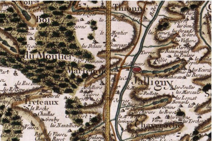 Carte selon Cassini de la région de Jaligny